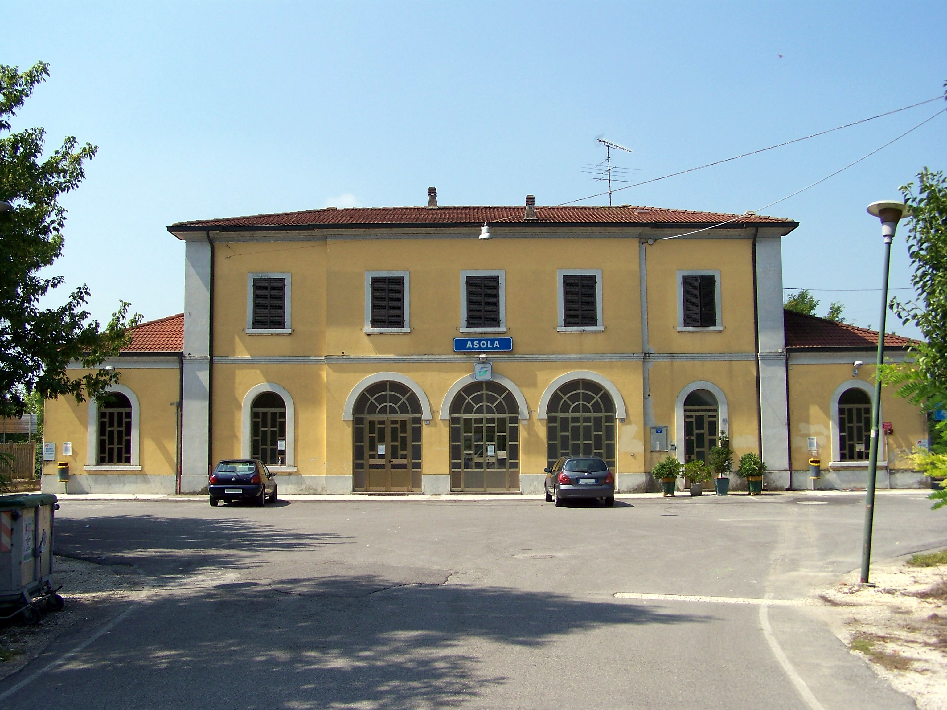 Lato campagna del Fabbricato Viaggiatori della stazione di Asola sulla Ferrovia Parma-Brescia.